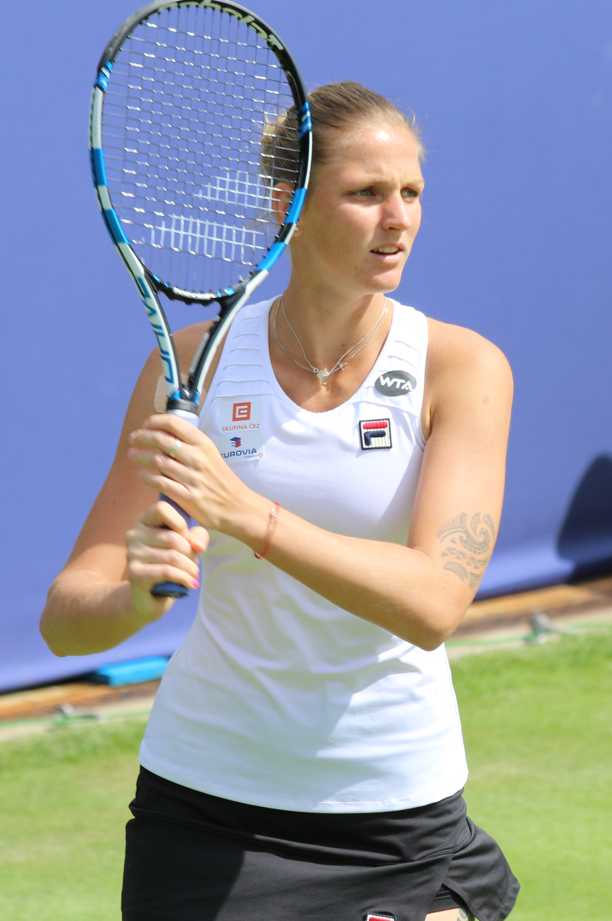 Pliskova Ka. BM16 (9)